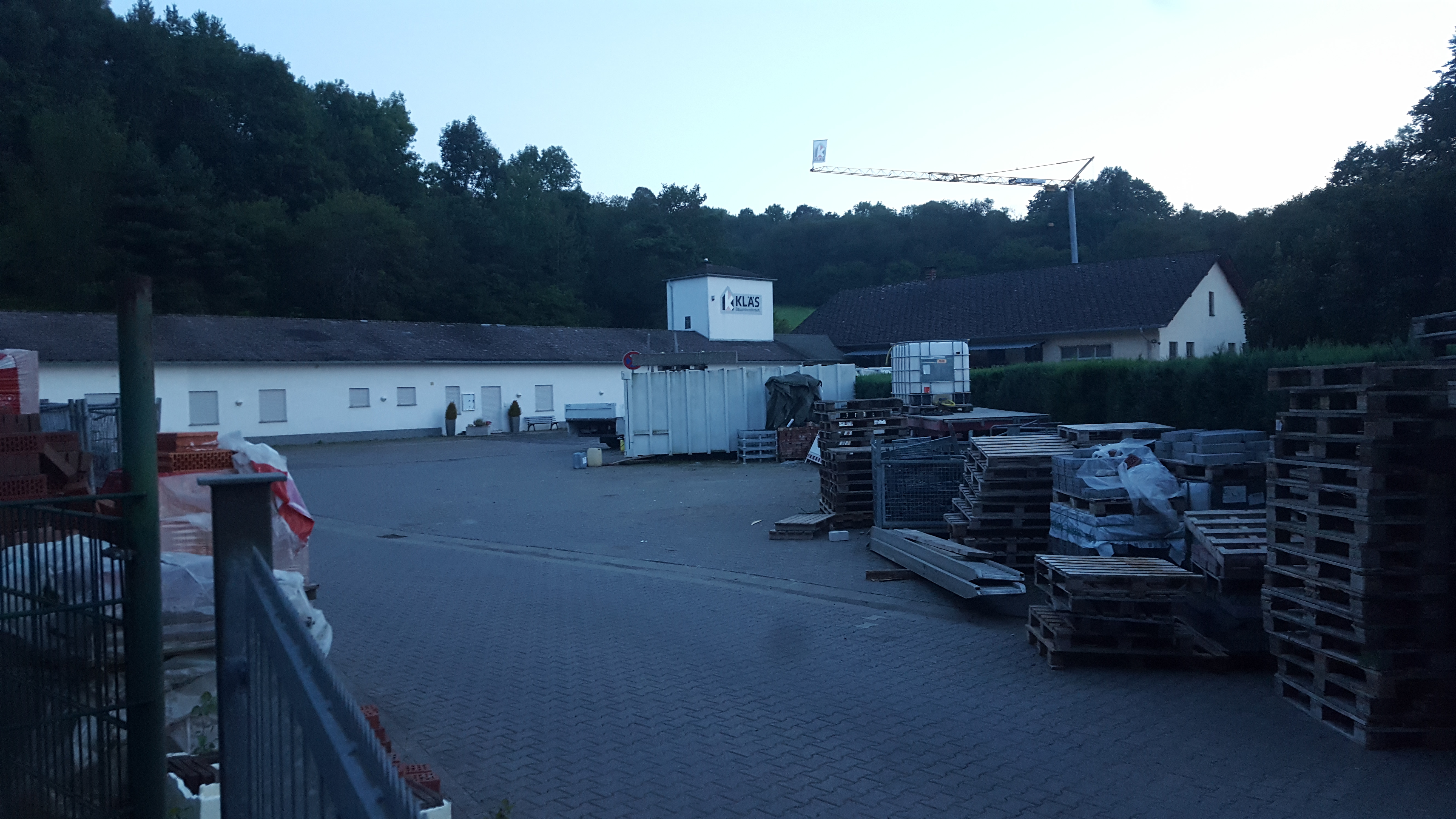 Ehemalige Grubengebäude der Grube Constanze bei Langenaubach/Hessen